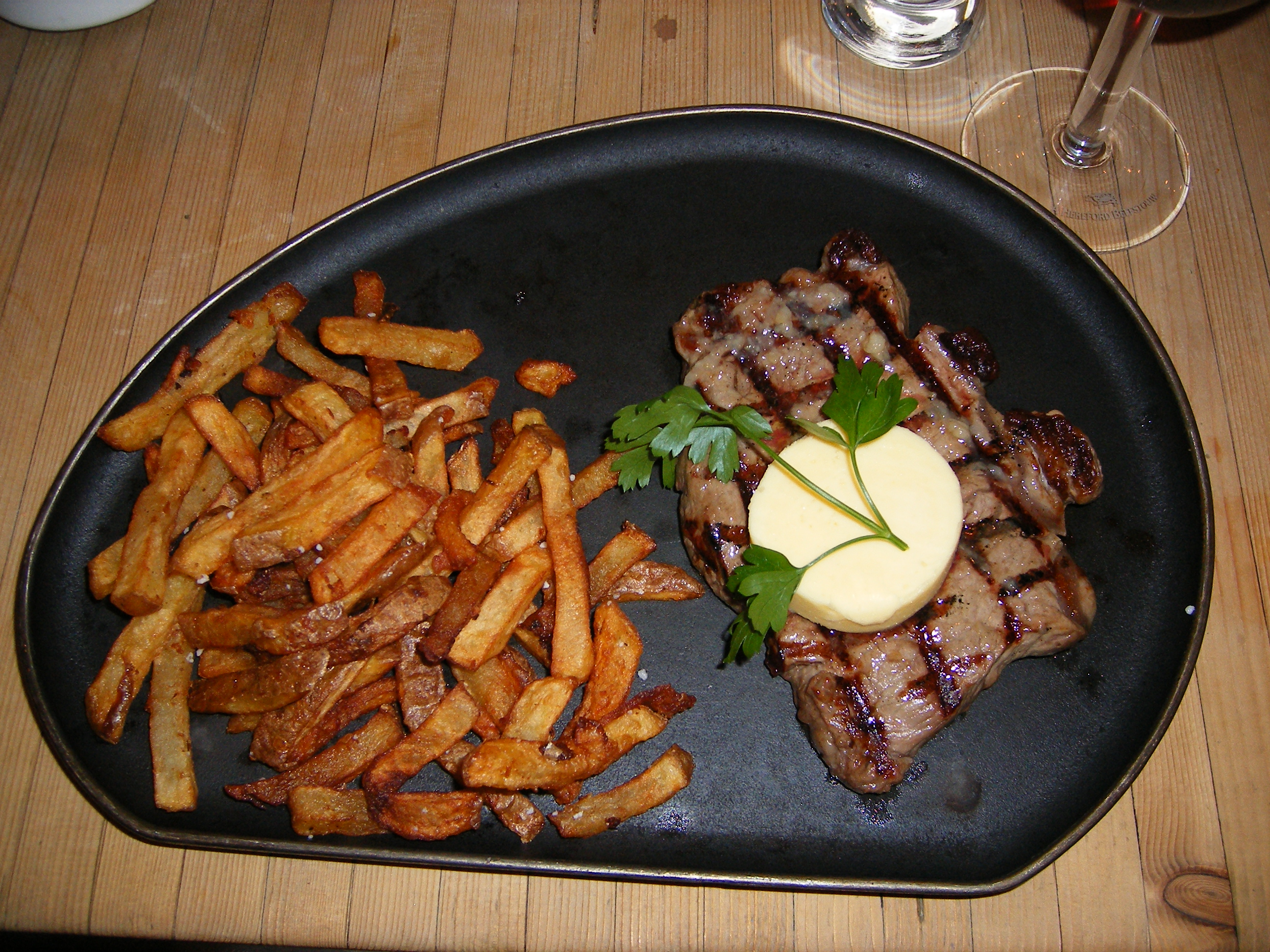 Sirloin steak, at "A Hereford Beefstouw" in Copenhagen, Denmark.